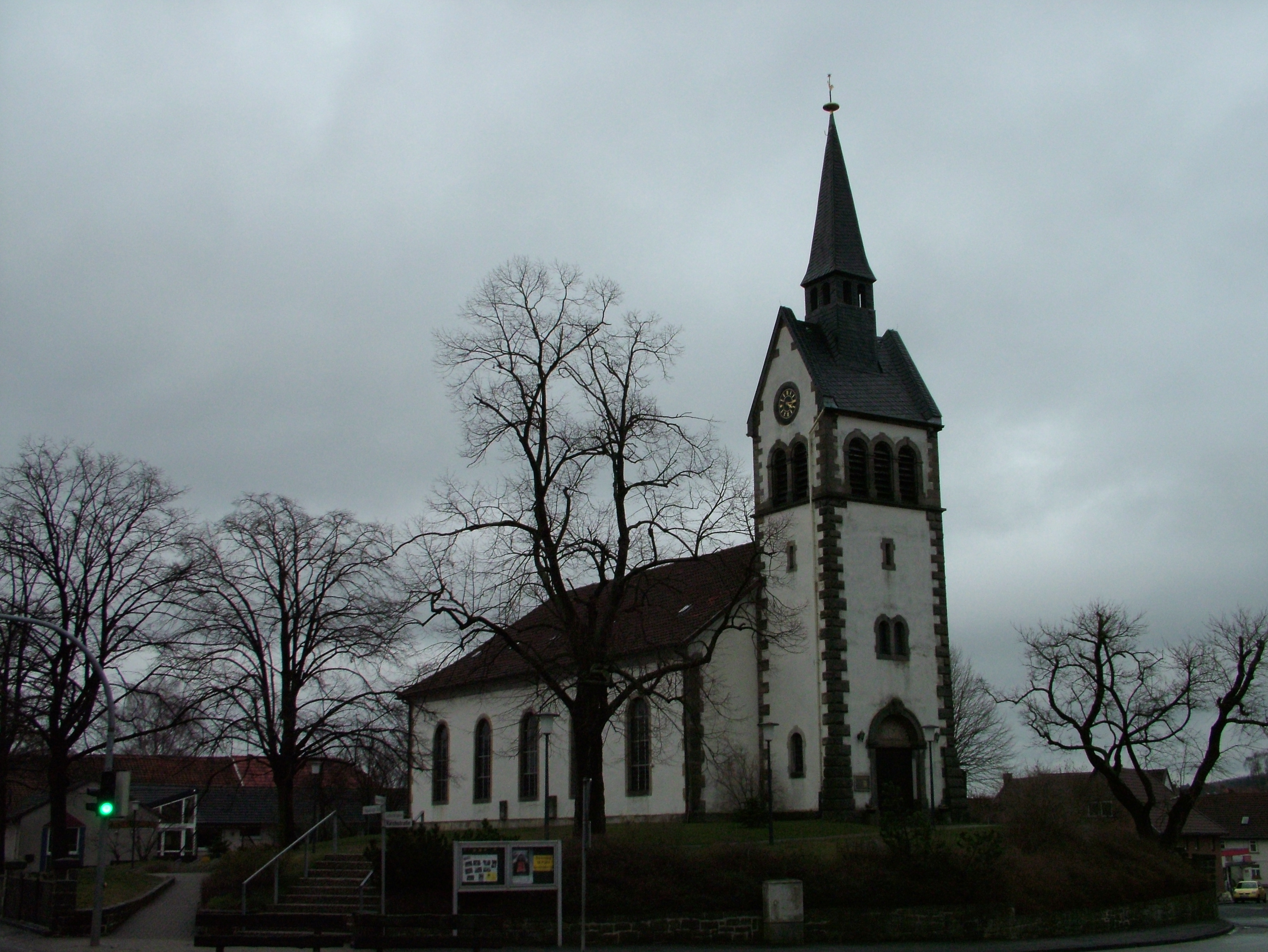 Grasleben in Niedersachsen. Das Bild zeigt die evangelische Kirche St. Maria.